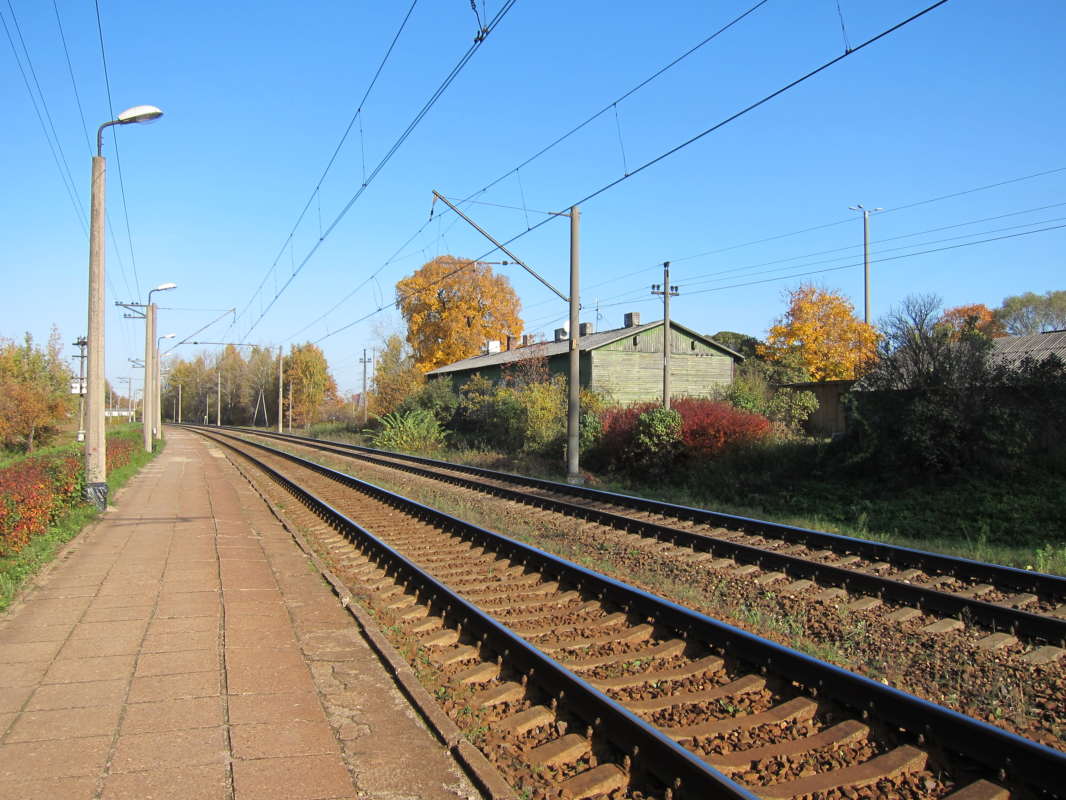 Tīraines stacijas perons un sliežu ceļi. Skats Rīgas virzienā.